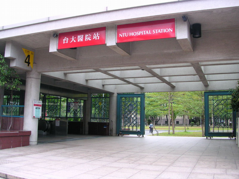 台北捷運台大醫院站4號出口。